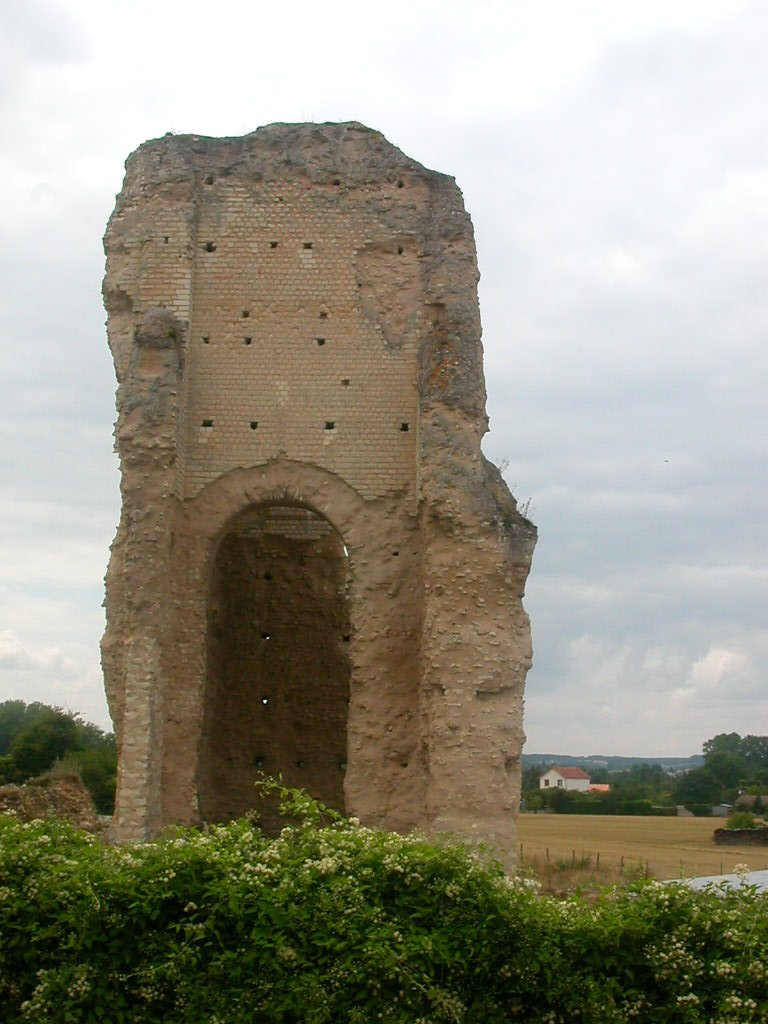 Théâtre gallo-romain de la cité de Lemonum, Naintré, Poitou, FranceBrezhoneg: C'hoariva Lemonum, ker gallian-roman, Naintré, Poetou, Bro C'Hall .